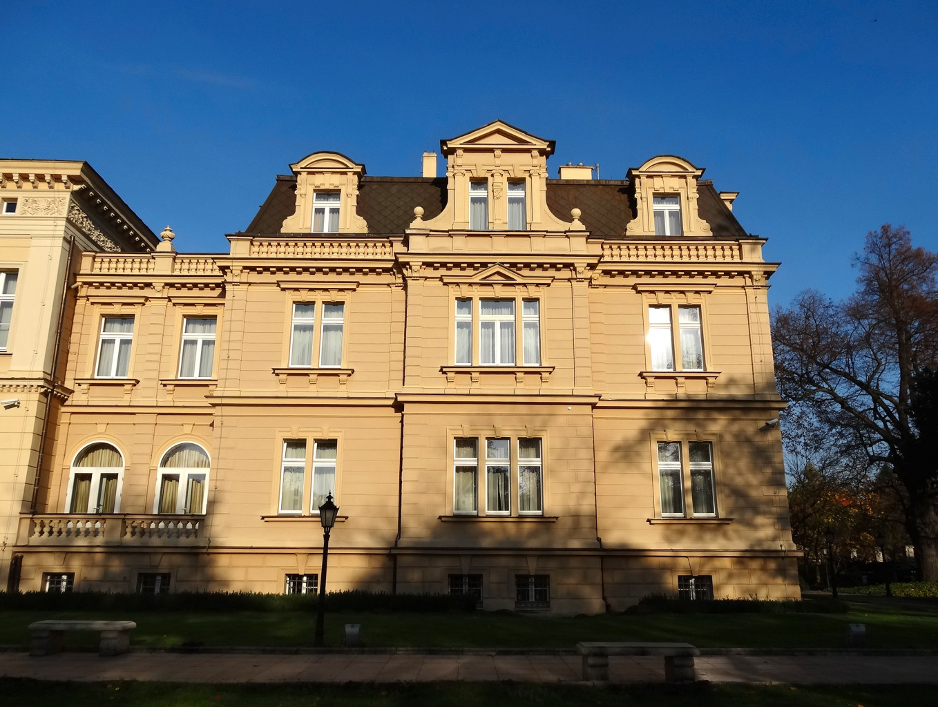 Ostromecko k. Bydgoszczy, pałac, tzw. Nowy, zbud. 1835-1848, 1891